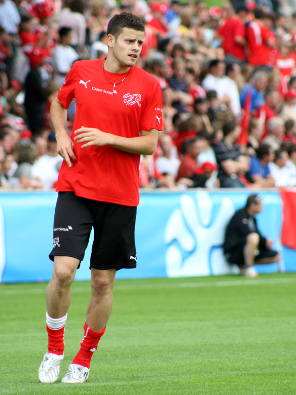 Tranquillo Barnetta im Trainingslager der Schweizer Fussballnationalmannschaft vor der Euro 2008